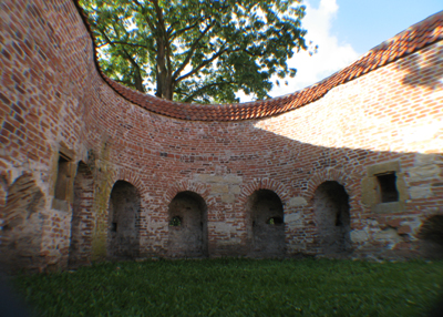 Innenbereich des Pulverturmes in Wiedenbrück